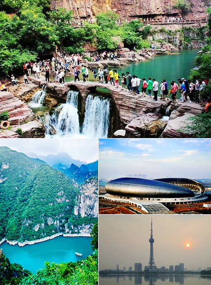 河南省焦作市